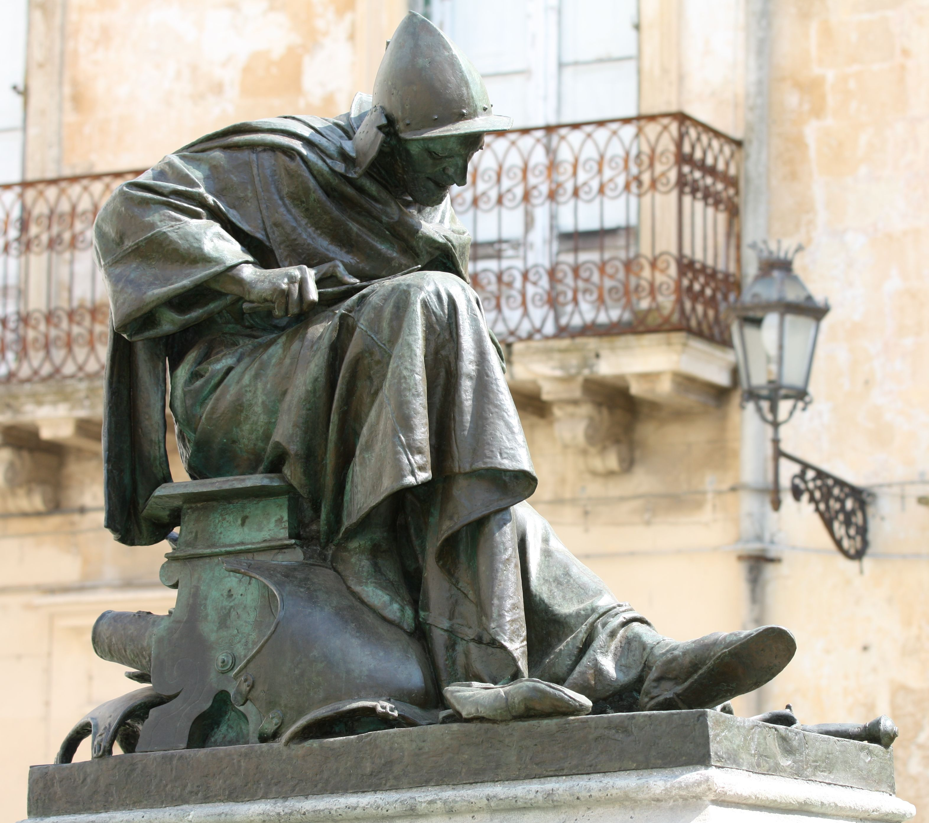 Fanfulla da Lodi in piazzetta Raimondello Orsini a Lecce